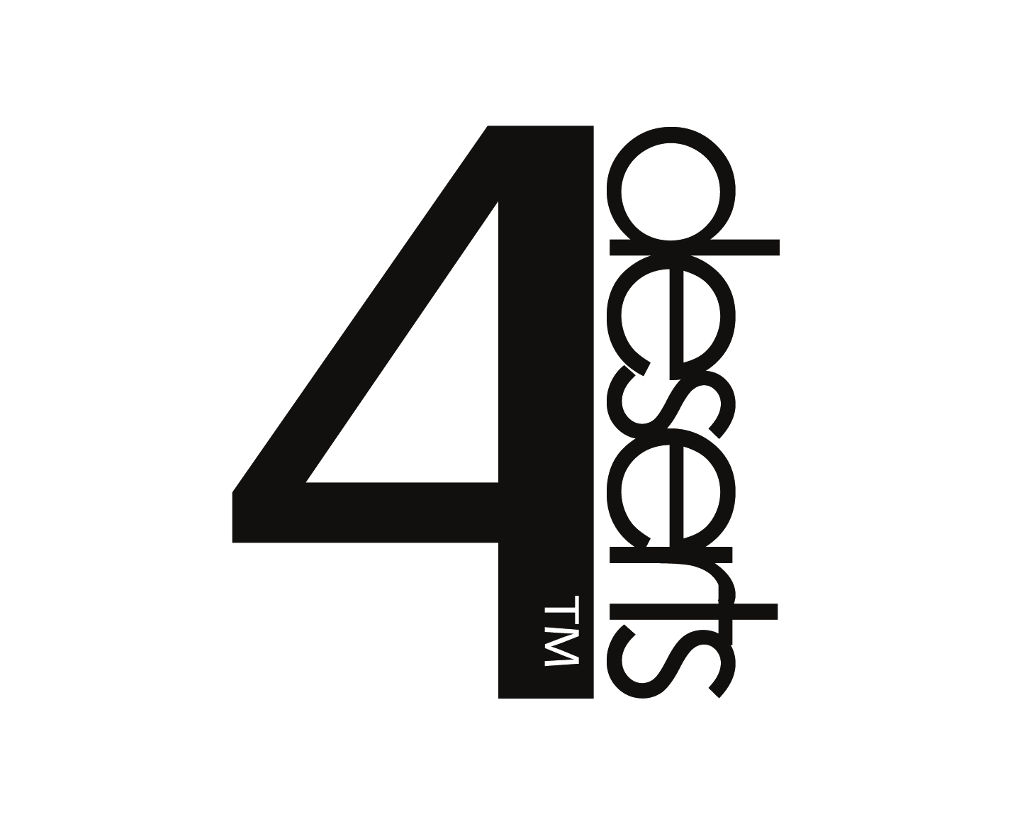 4 Deserts logo